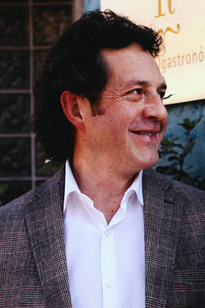 Daniel Sagüés, director de televisión chileno, y Rodrigo Salinas, comediante y dibujante.